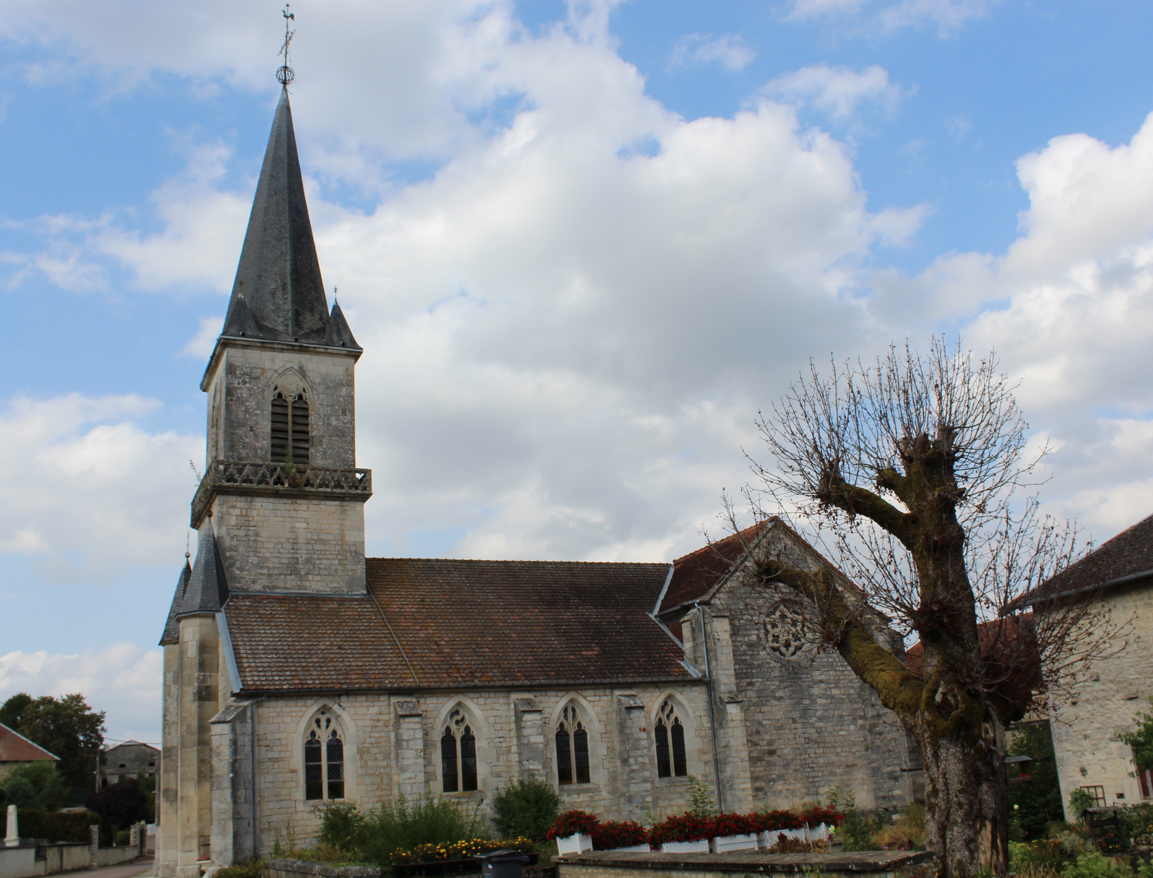 L'église.